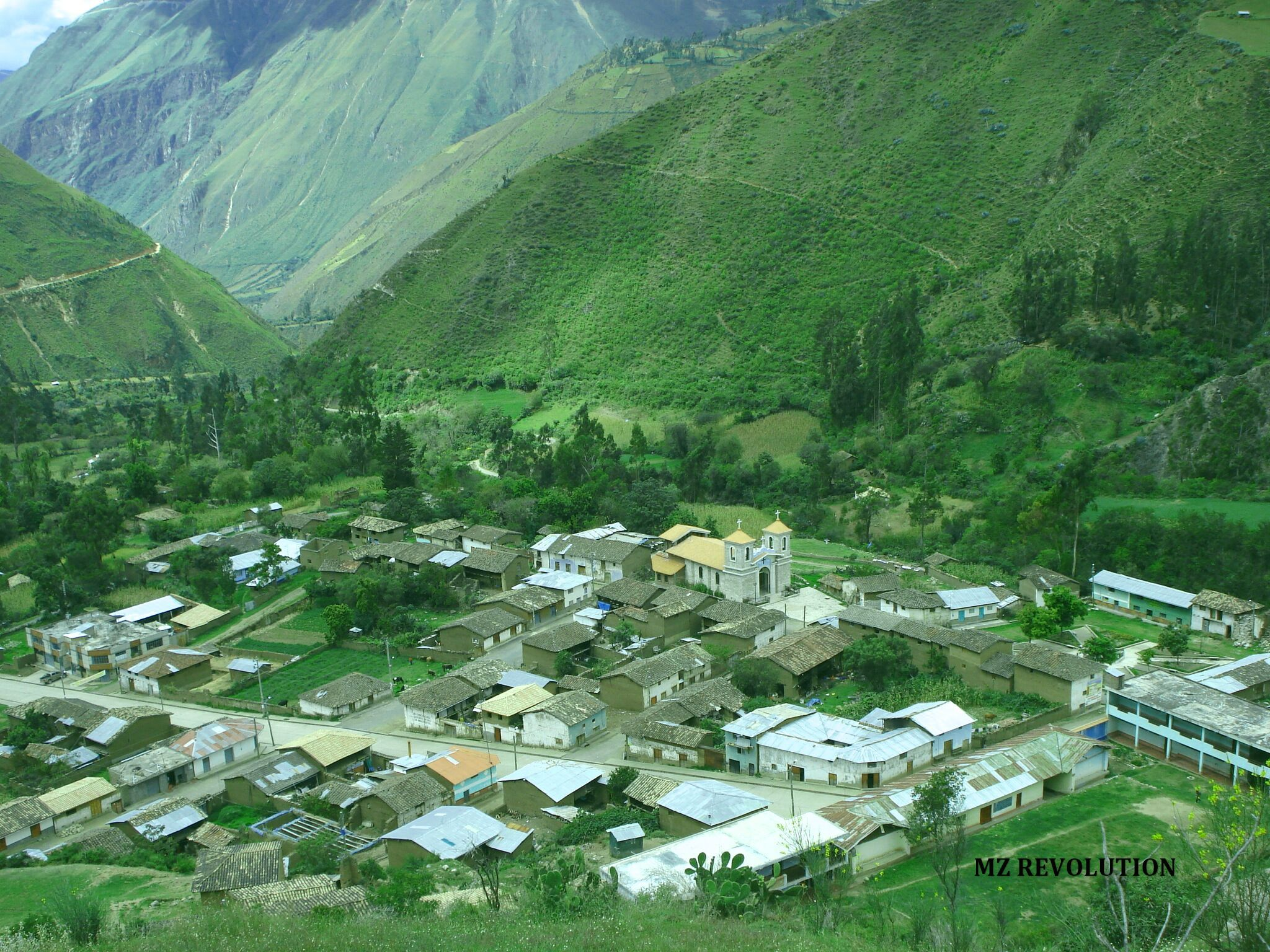 mejor distrito del Perú